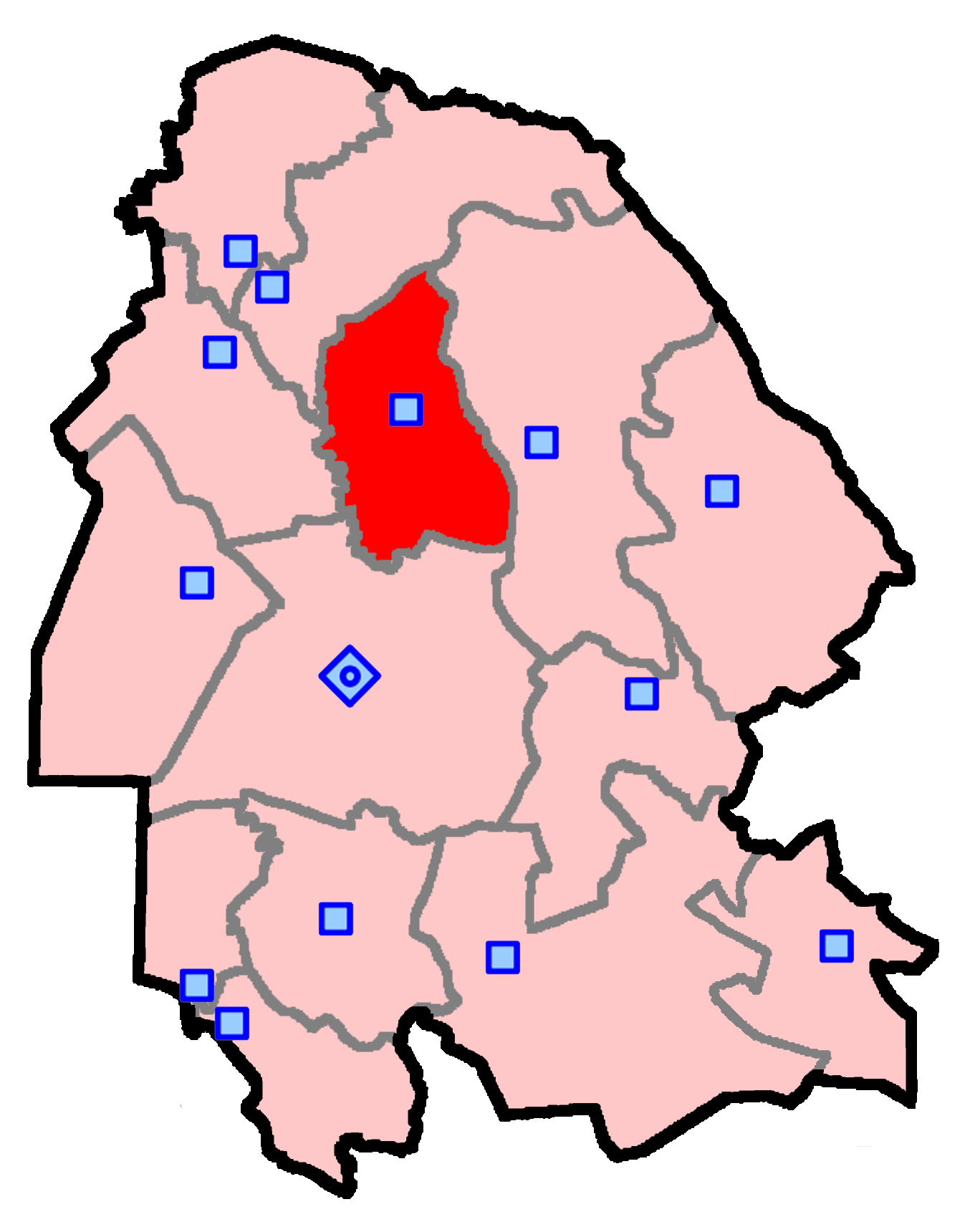 حوزهٔ انتخاباتی شوشتر و گتوند برای انتخابات مجلس شورای اسلامی